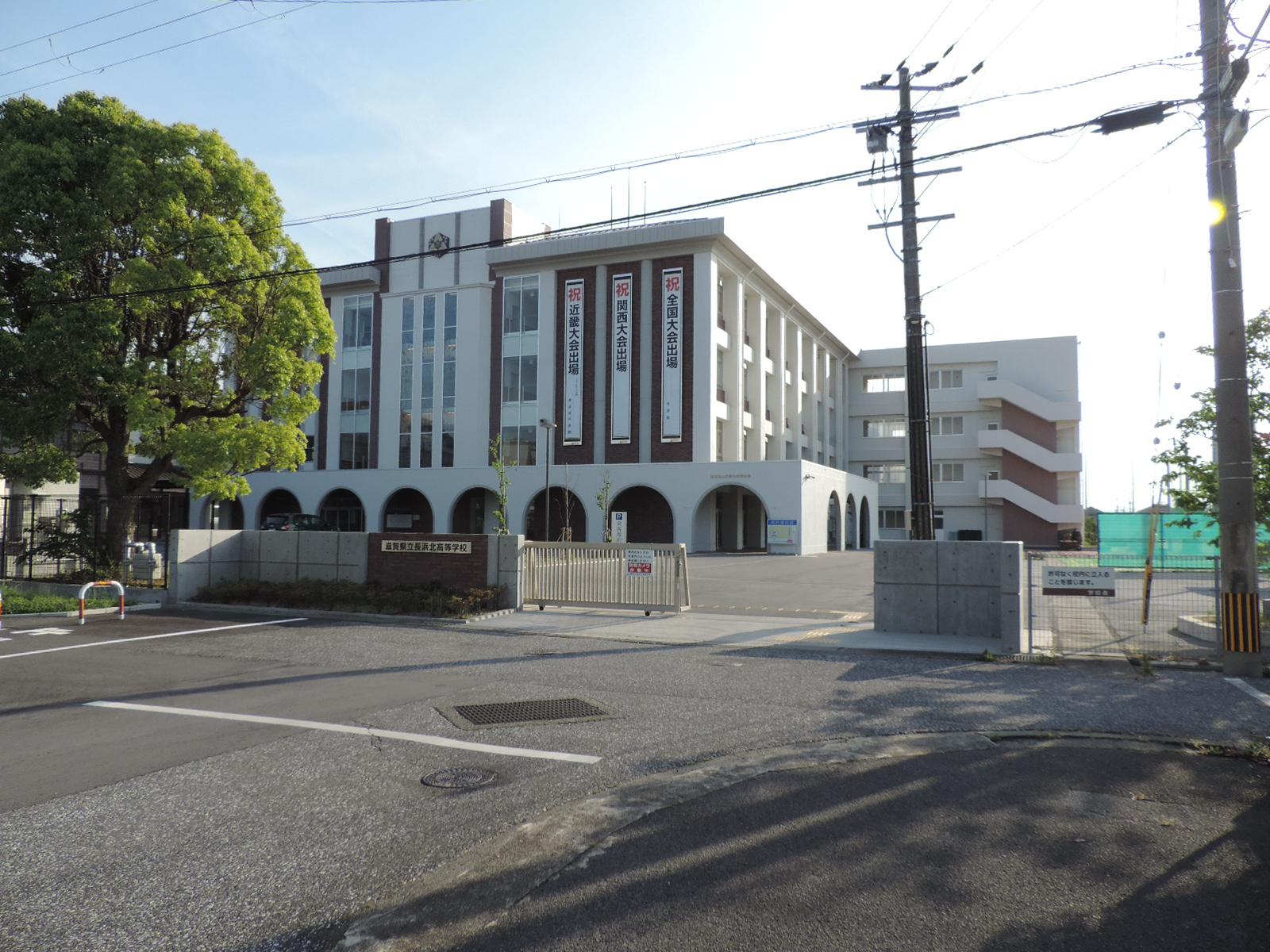 滋賀県立長浜北高等学校（滋賀県長浜市平方町）。2020年5月撮影。